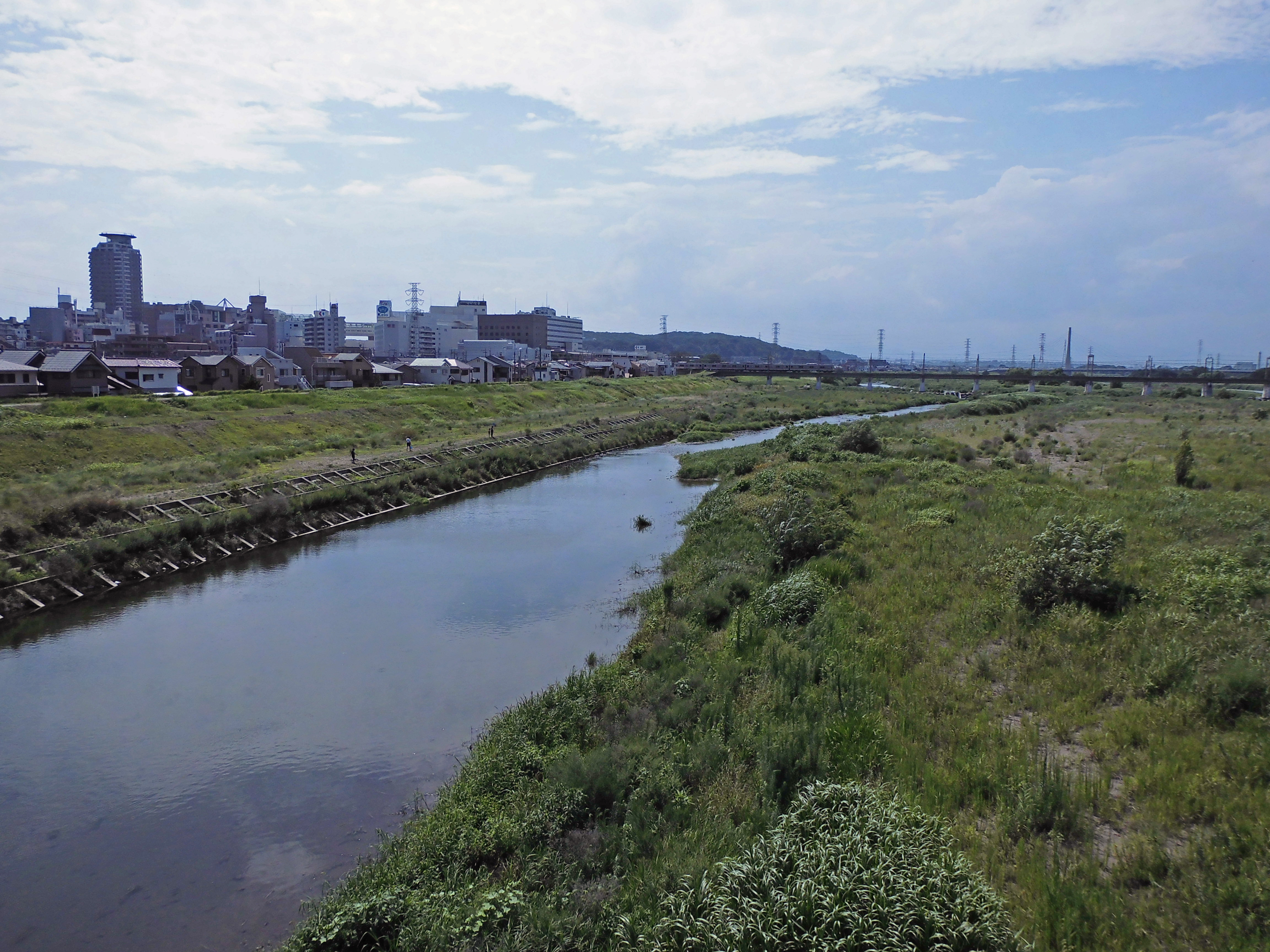 聖蹟桜ヶ丘の北を流れる多摩川130805